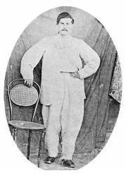 Цанко Дюстабанов